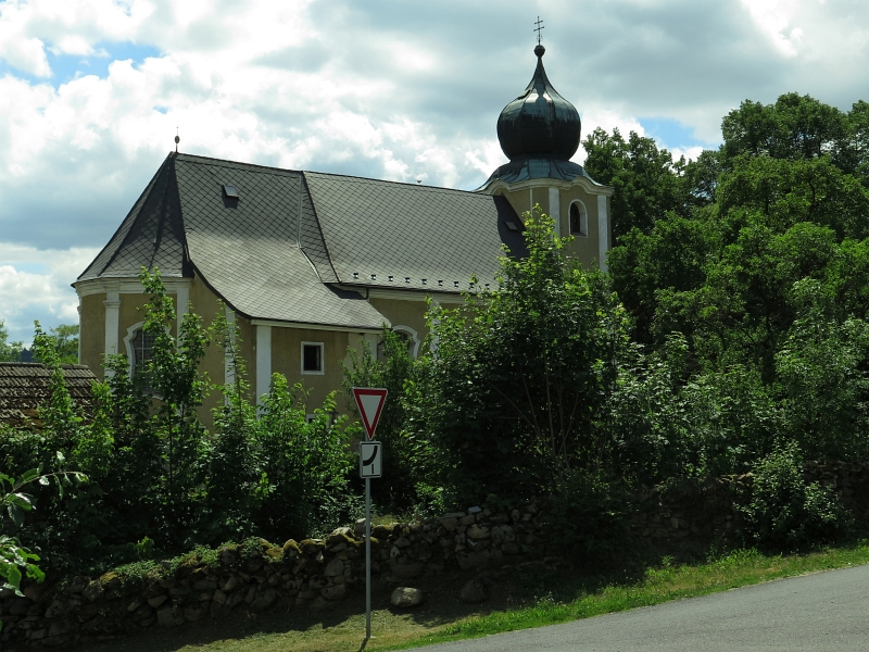 Kostel Nejsvětější Trojice, Zavlekov.